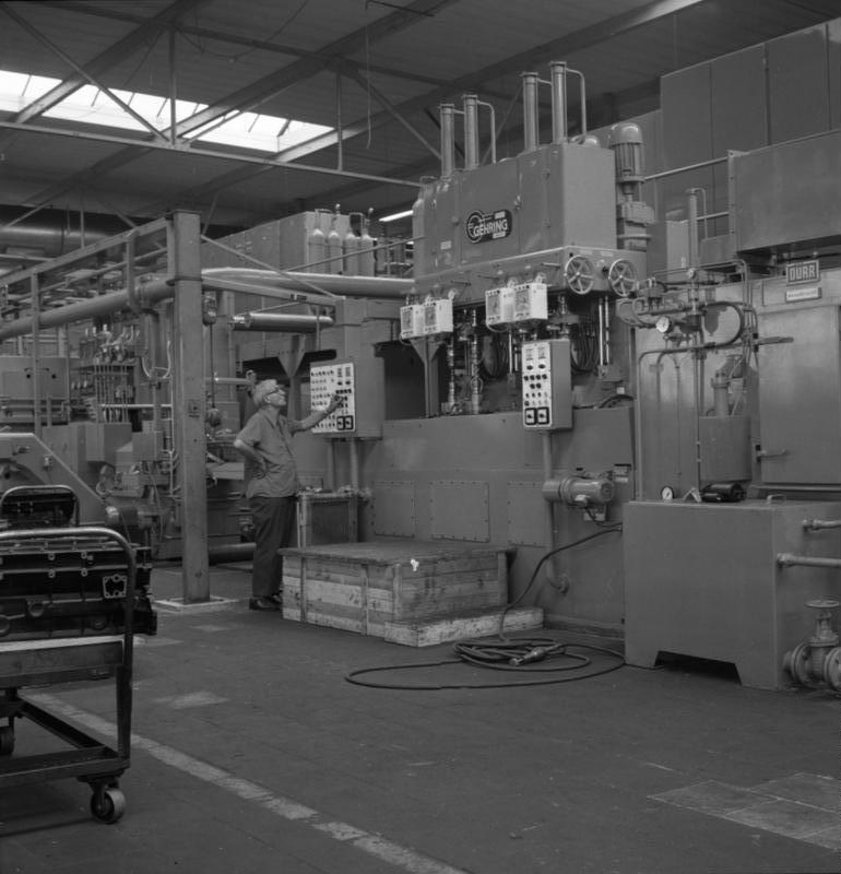 Autowerk BMW-München Halle 140 Neue Transportstraße für 6 Zyl. Motorblöcke, Honen der Zylinderlaufbahnen. Gleichzeitig mit der Entstehung der Karosserie werden auch die übrigen Aggregate, Motor und Radaufhängung, gefertigt. In diesem Bild wird eine der Transfermaschinen der neuen Sechszylinder-Motoren-Straße gezeigt, die - wie ersichtlich - soeben erprobt wird. Information added by Wikimedia users.Motorblöcke der Sechszylinder-Reihenmotoren BMW M30 für BMW E3 und BMW E9